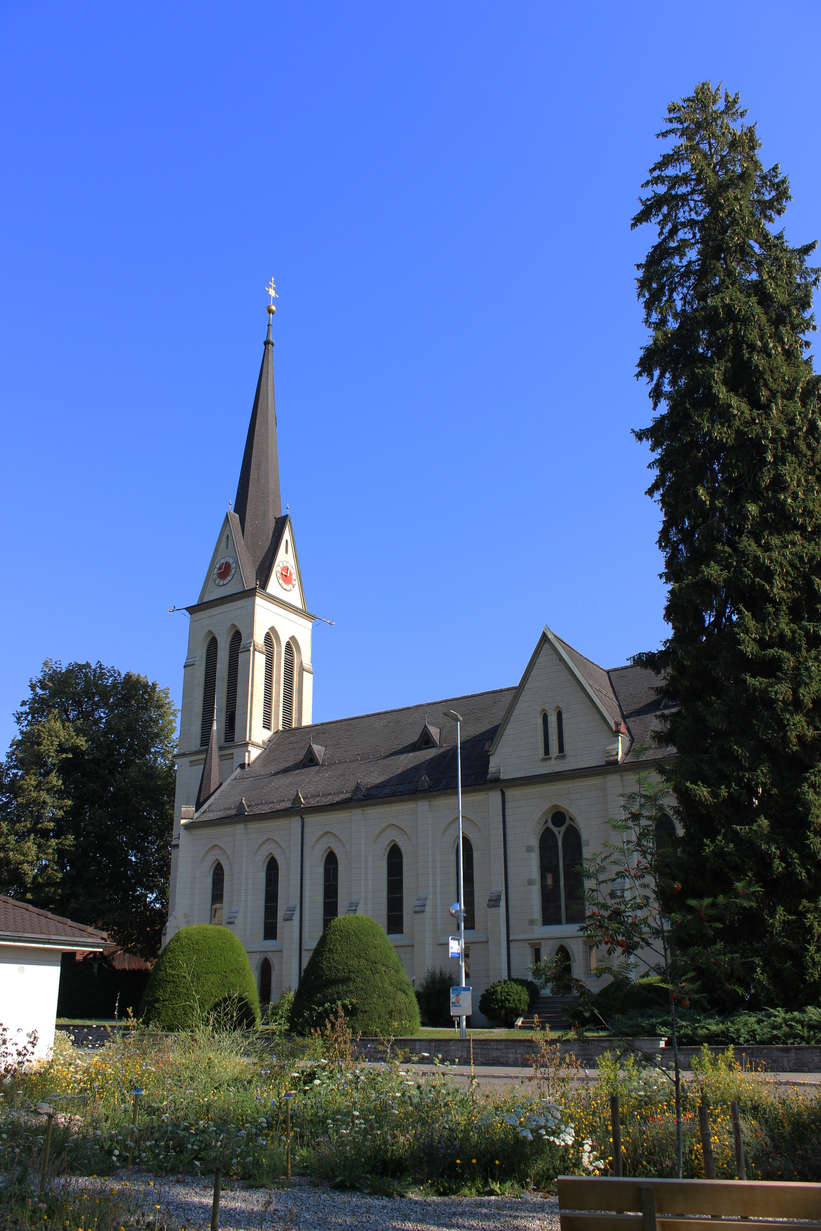 Marienkirche Dussnang aus Richtung Süden